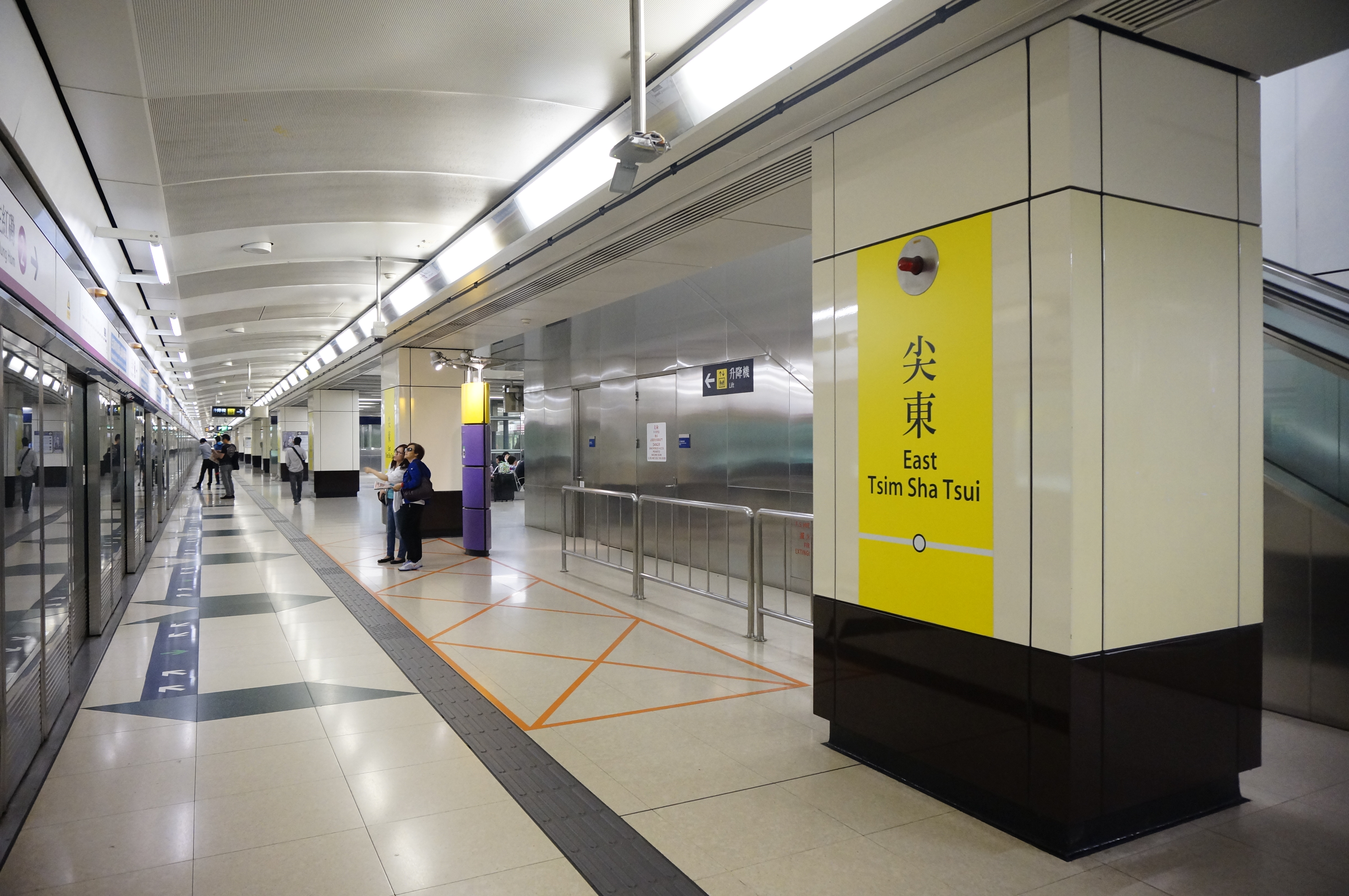 港鐵尖東站月台